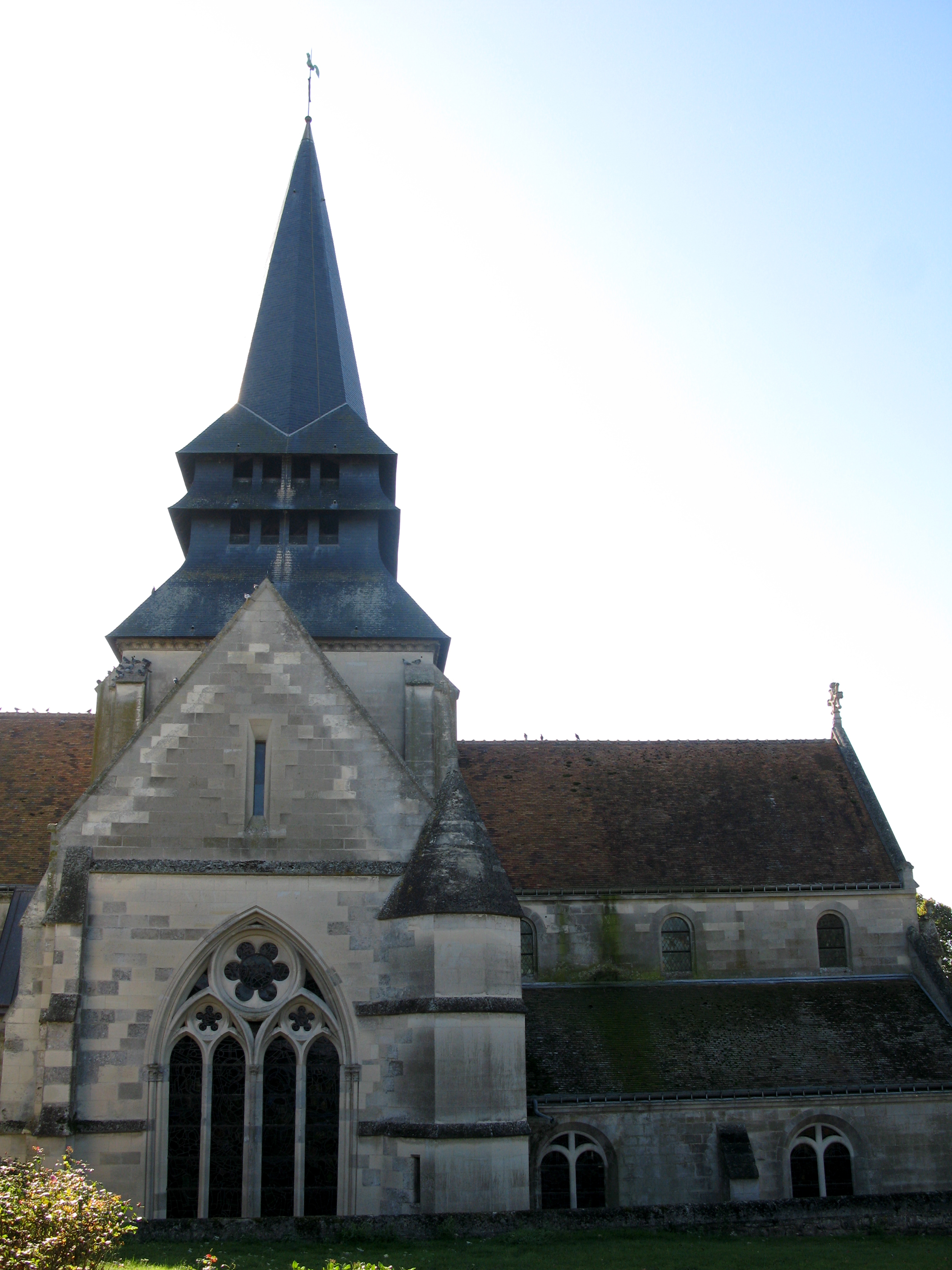 Saint-Pierre-Aigle (Aisne, France) - L'église Saint-Pierre. . .